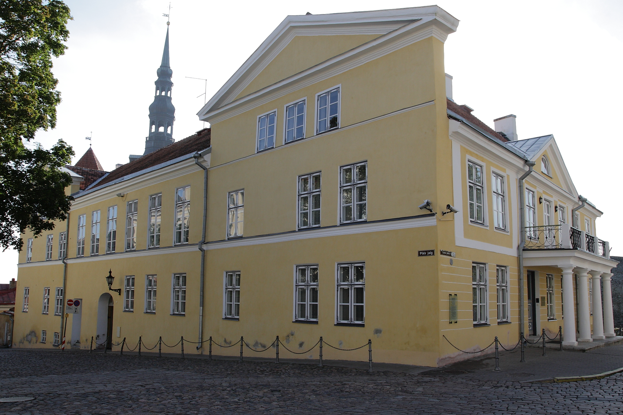 Tallinn, elamu 18.–20. saj, kus 1919–1929 asus Riigivanema residents